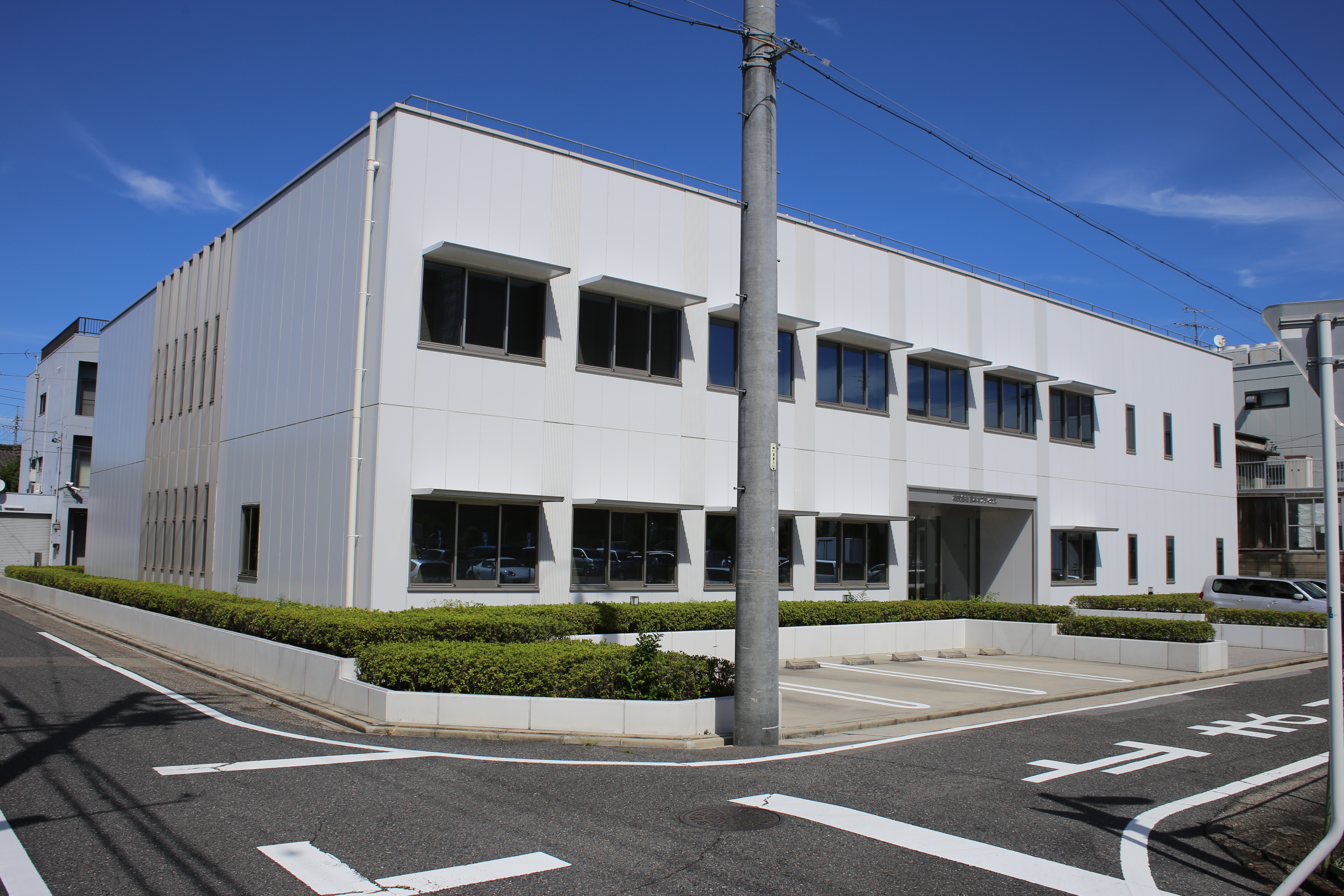 名古屋市西区則武新町二丁目の日本オプティカル本社を西側公道南側より撮影